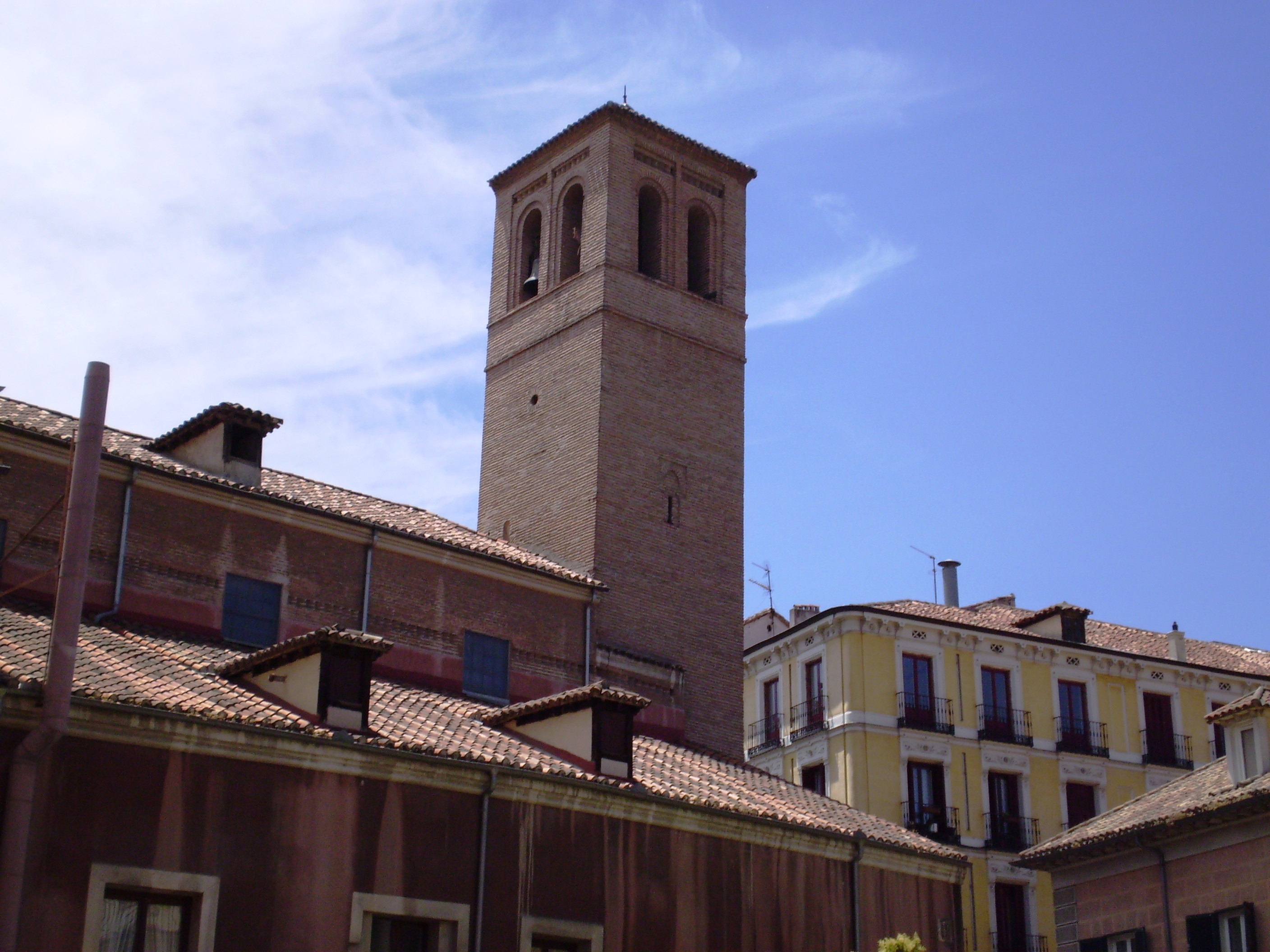 Iglesia de San Pedro el Viejo. Madrid, Spain